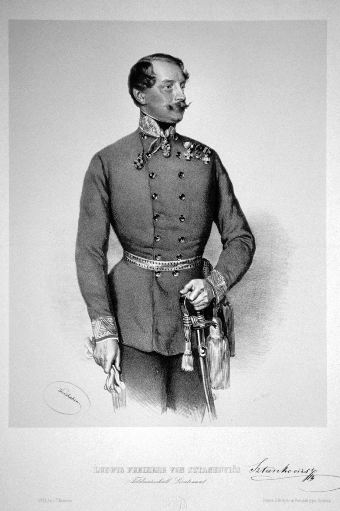 Ludwig Freiherr von von Sztankovics (1805-1868), k. k. Feldzeugmeister. Lithographie von Josef Kriehuber, 1852